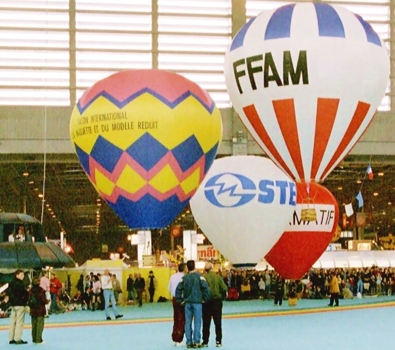 Modélisme aérien, montgolfières lors du mondial de la maquette et du modèle réduit de 2002, (porte de Versailles). Auteur: Greudin, fr:2002 Licence: Domaine public Catégorie:Wikiprojet Aéromodélisme